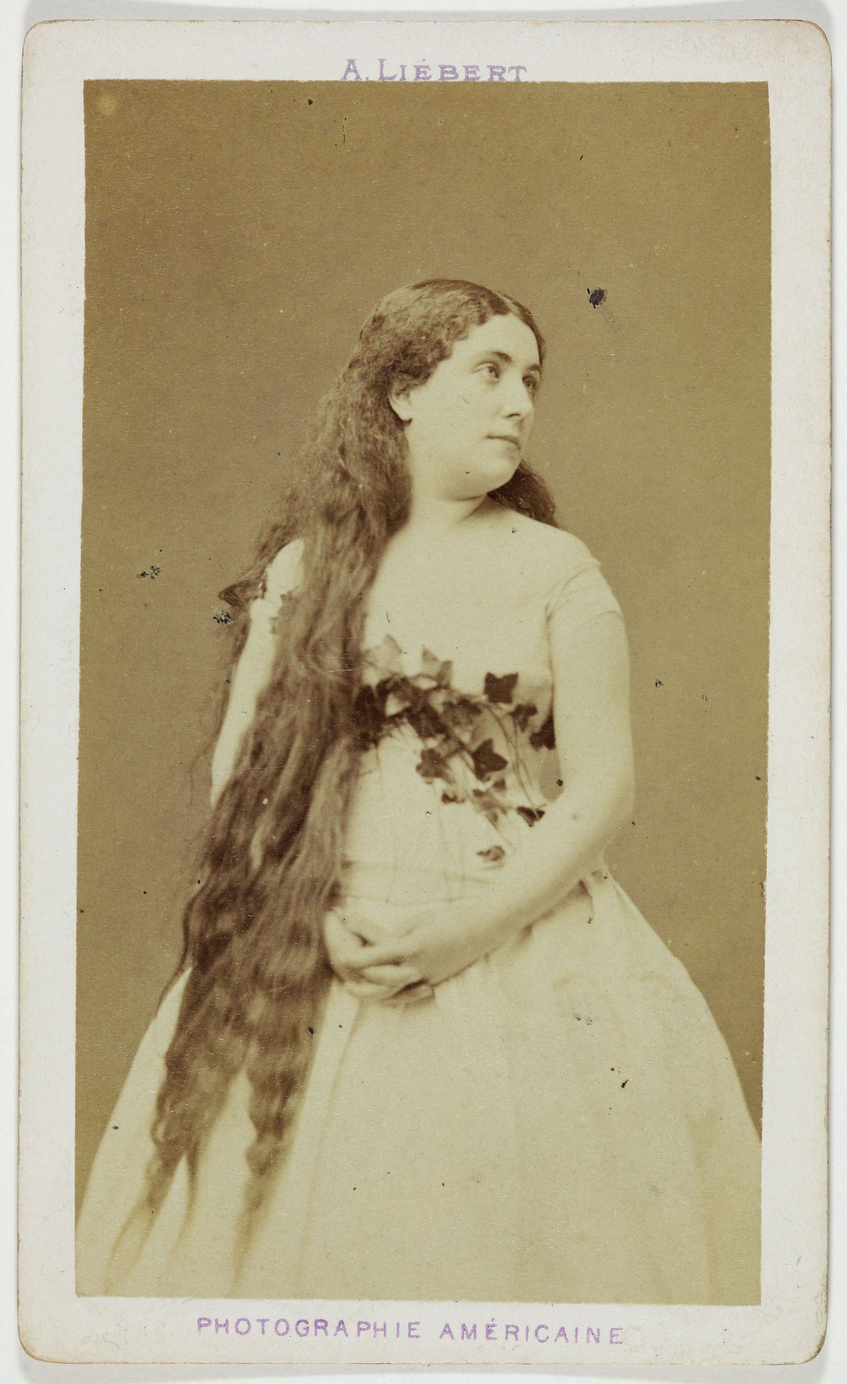 Alphonse Liébert. Portrait de Louise Charlotte Abingdon-Legaigneur, actrice. Carte de visite (recto). Tirage sur papier albuminé. 1870-1890. Paris, musée Carnavalet.